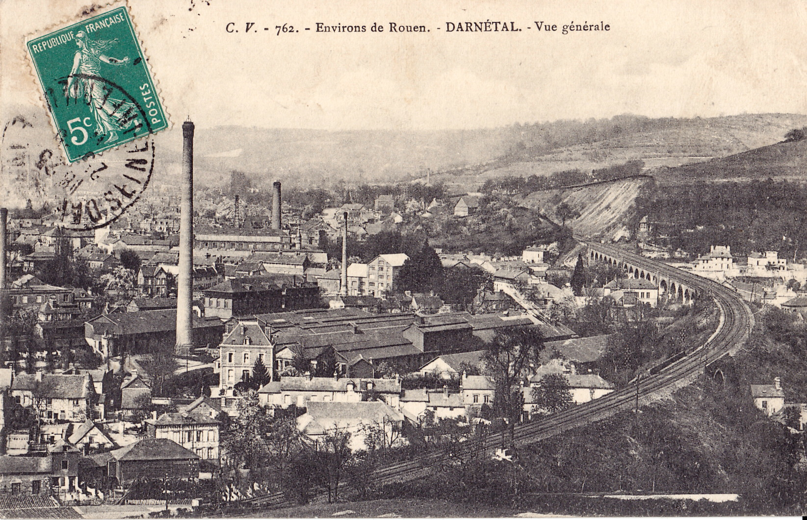 Carte postale ancienne éditée par CV, collection Environs de Rouen, n°762 :DARNETAL - Vue générale - la cheminée la plus haute marque l'emplacement de l'usine de la société Lucien Fromage et Cie.